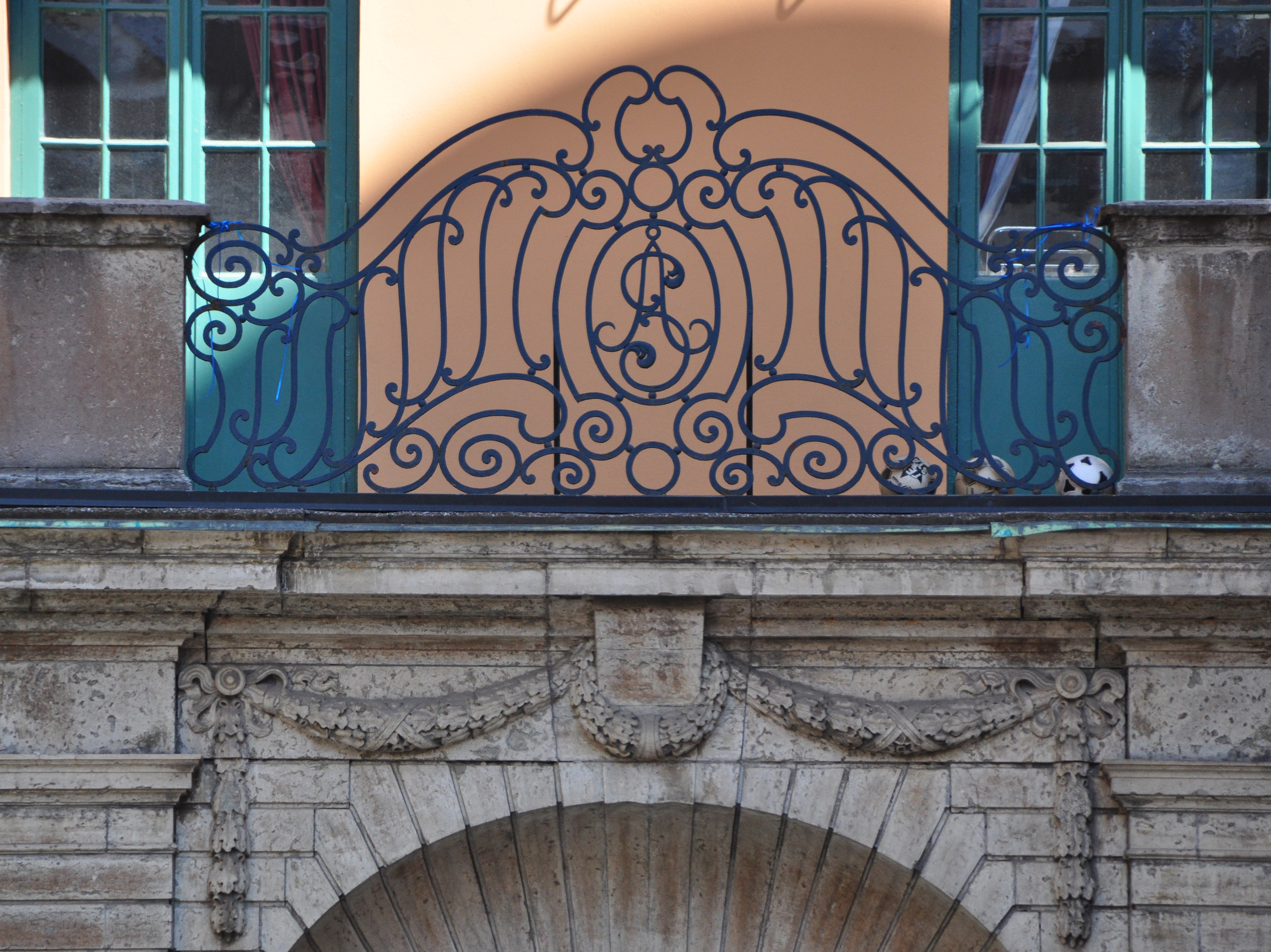 Åhlinska skolan, monogram i räcke